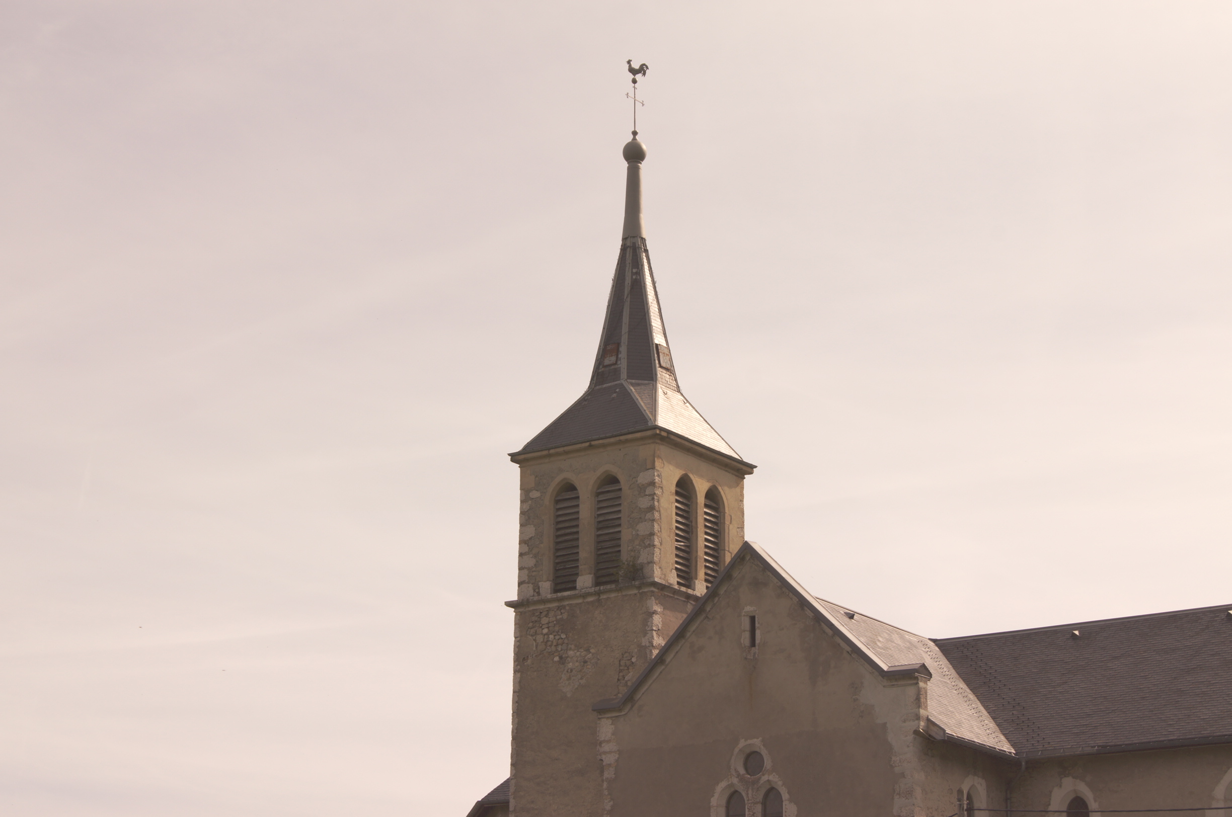 L'église